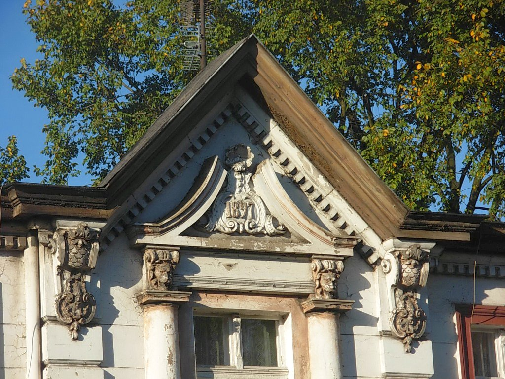 Detal kamienicy przy ul. Toruńskiej w Bydgoszczy